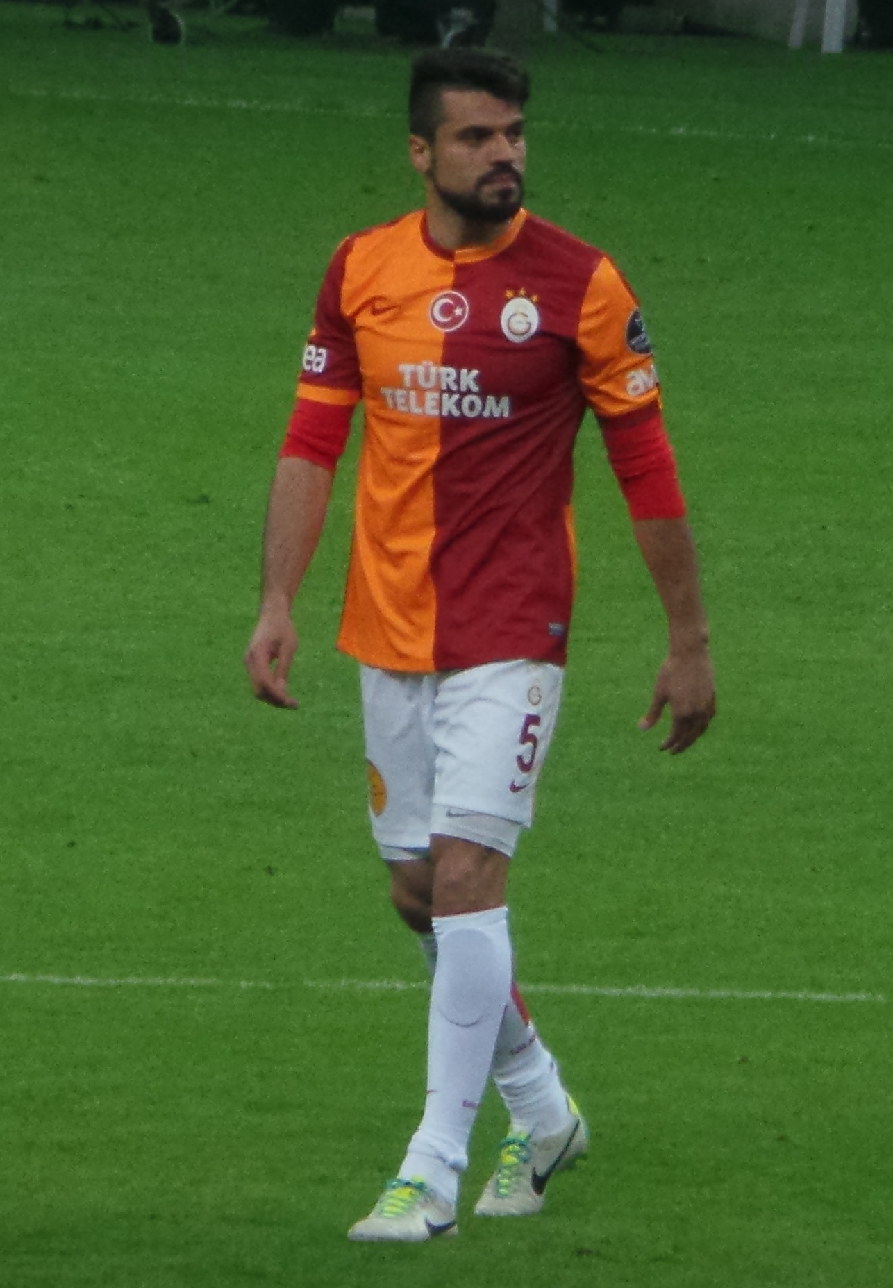 Gökhan Zan Beşiktaş maçında